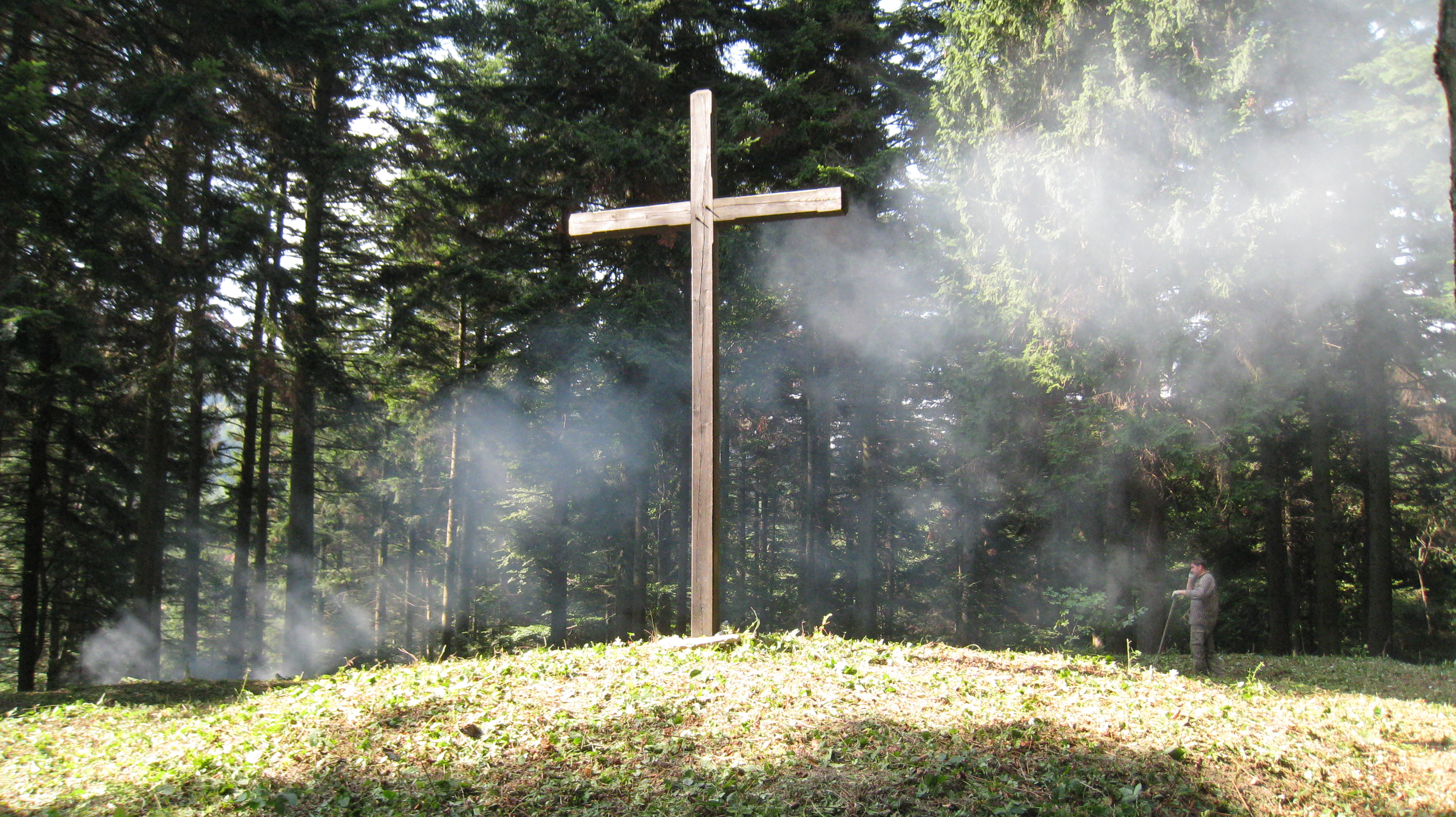 Пам'ятний хрест загиблим солдатам на горі Острогірка